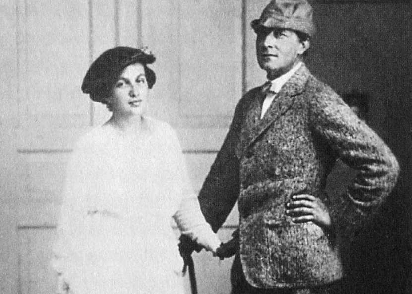 Ragnar Östberg med hustru Karin Thiel